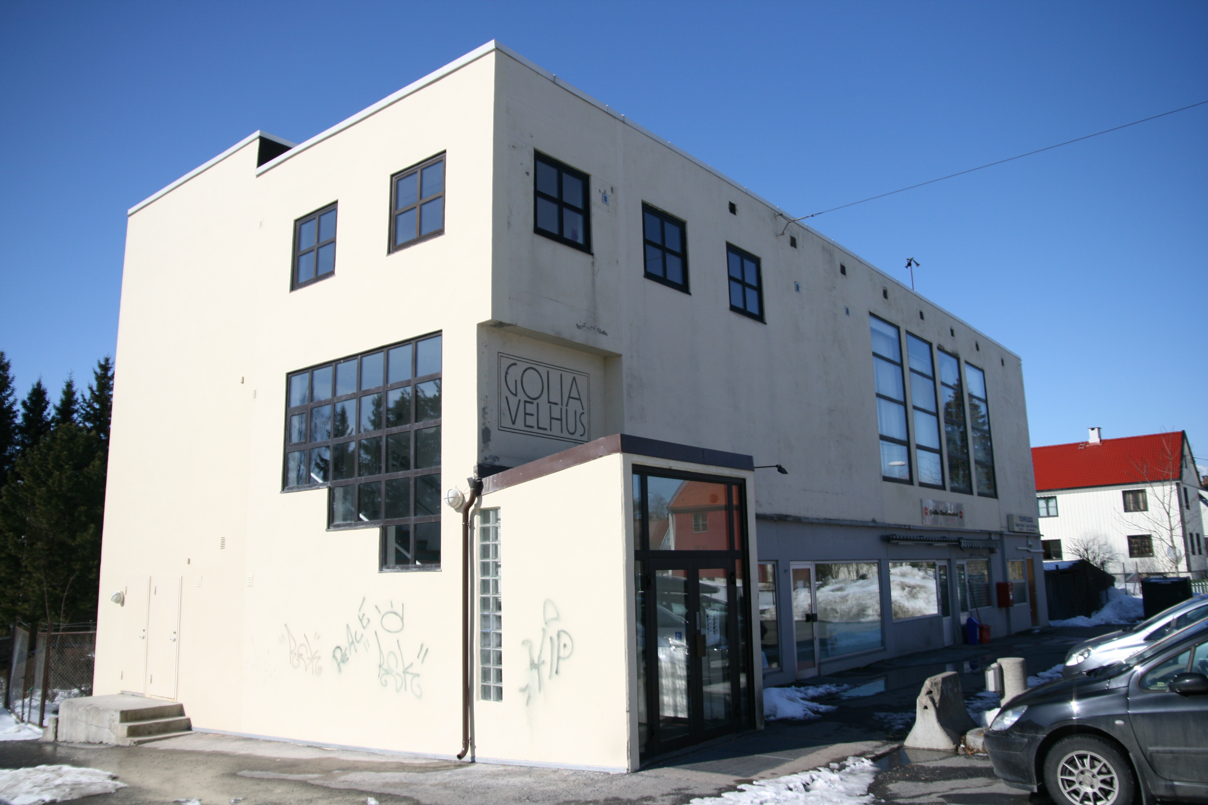 Golia Velhus i Bydel Østensjø i Oslo.